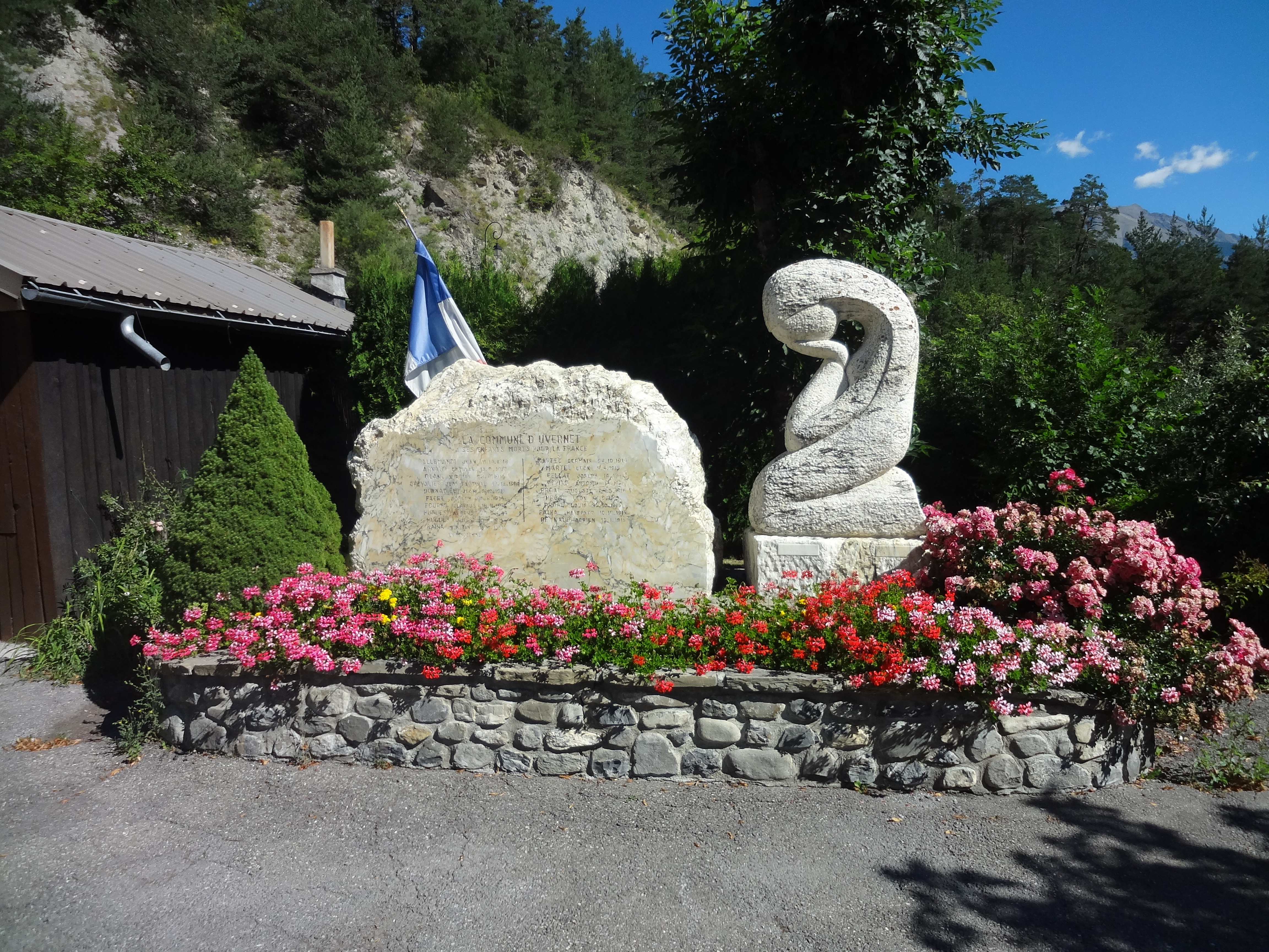 Monument aux morts d’Uvernet-Fours (sculpteur : Debacker)